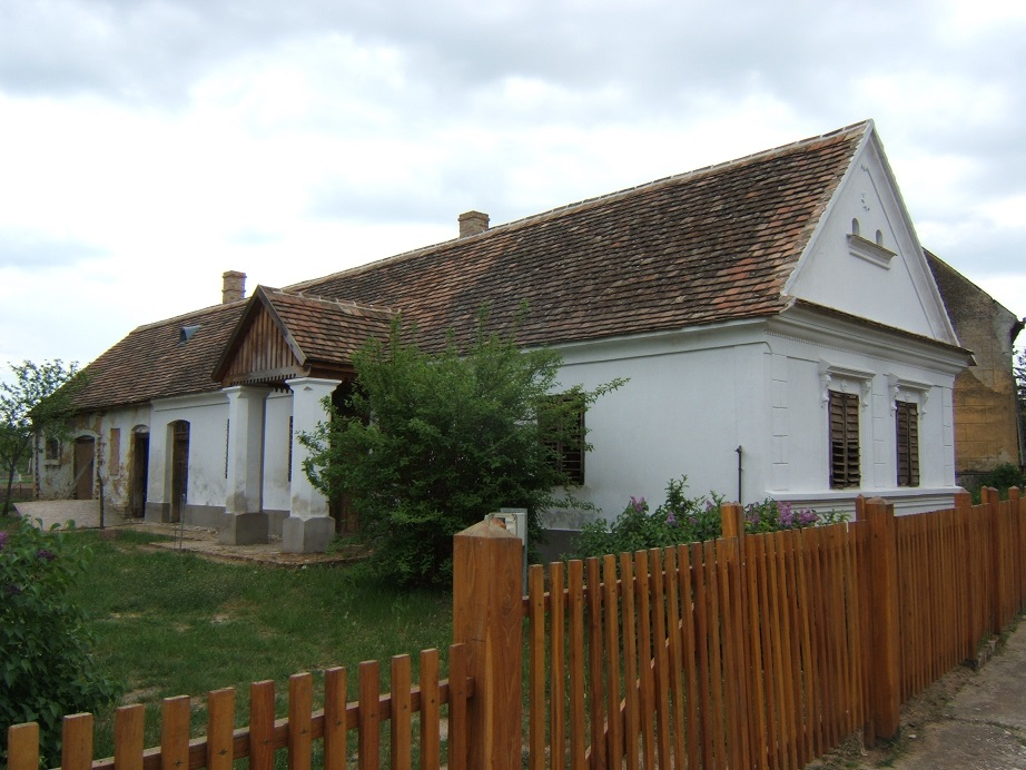 Mezőcsokonya, tájház (1884-ben épült)